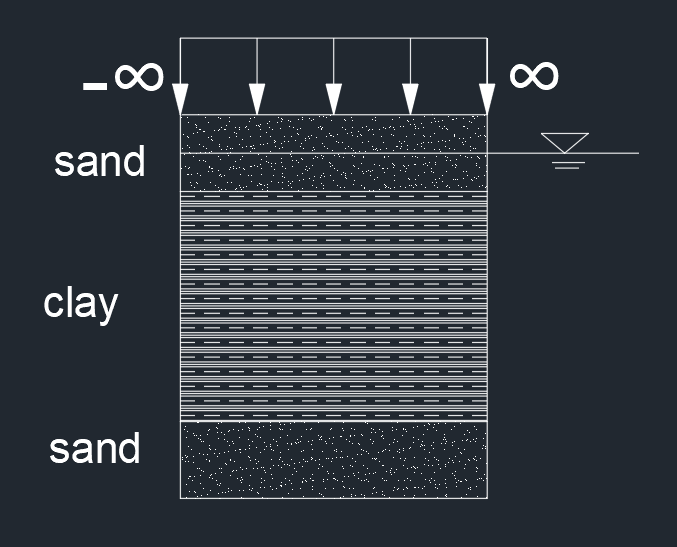 무한등분포하중 양면배수